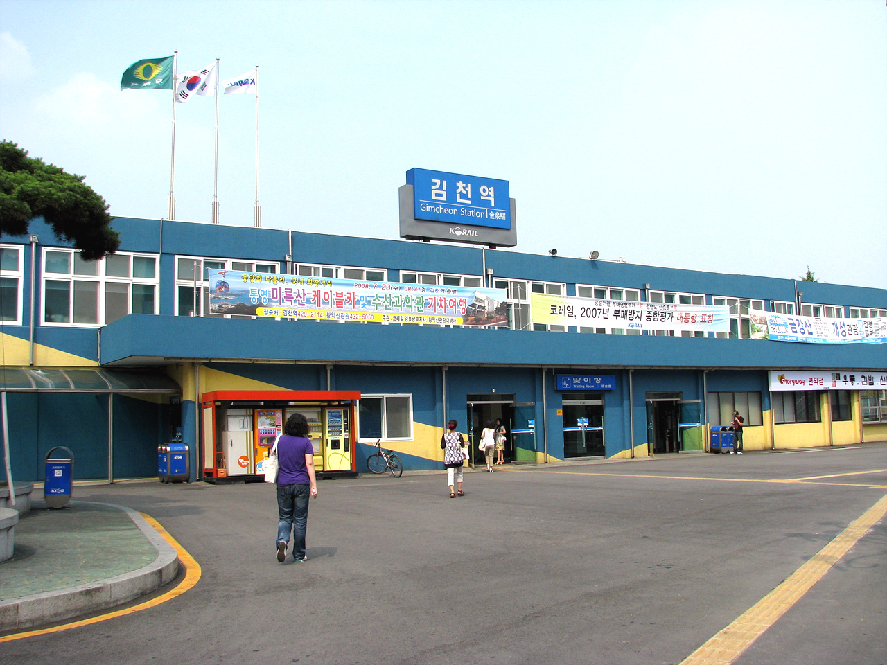 金泉駅 駅舎